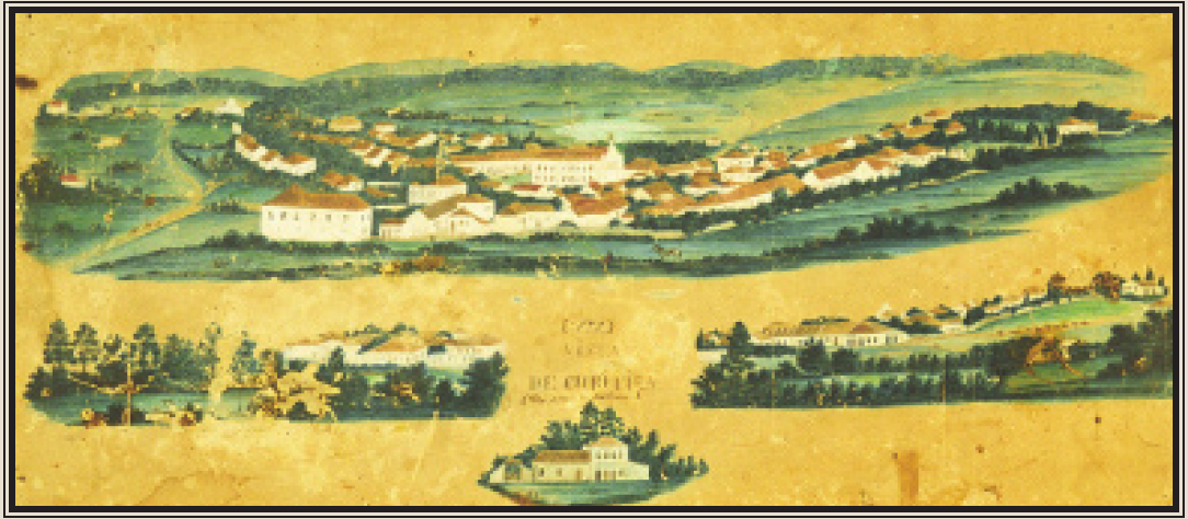 Aquarela com vista de Curitiba em 1855 de John Henry Elliot (1809 - 1884) . obs.: como base o ano de 2011 = 127 anos da morte do autor.